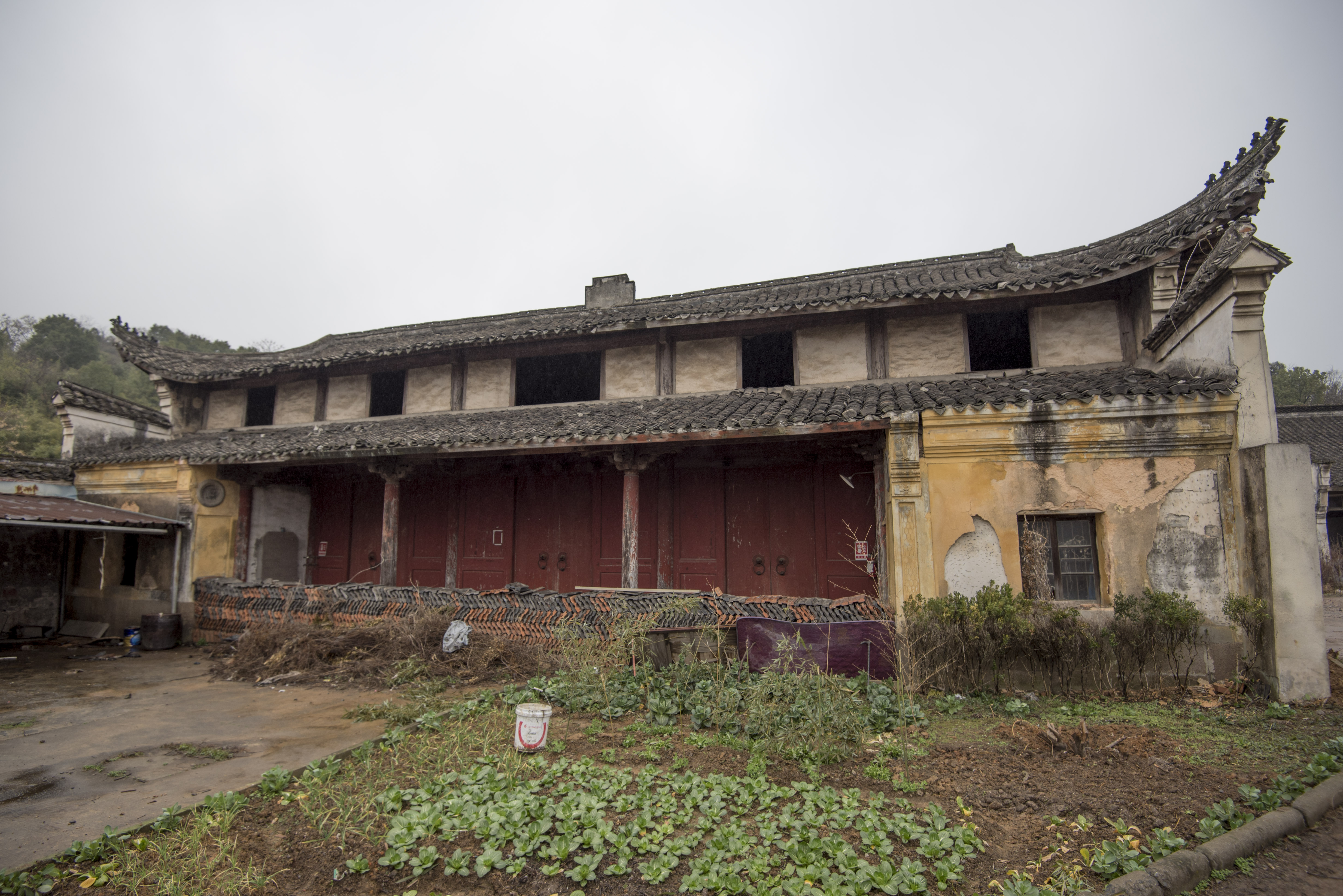 澥浦都神殿